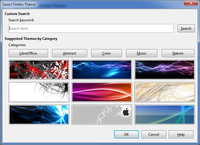 В версии LibreOffice 4.4.х Реализован новый интерфейс для применения в тем оформления, подготовленных для Firefox.